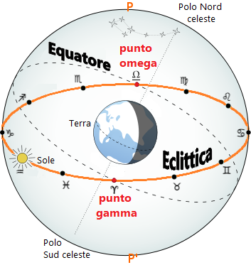 Equatore celeste ed eclittica, che si intersecano nel punto omega e punto gamma; lungo l'eclittica sono indicati i simboli zodiacali